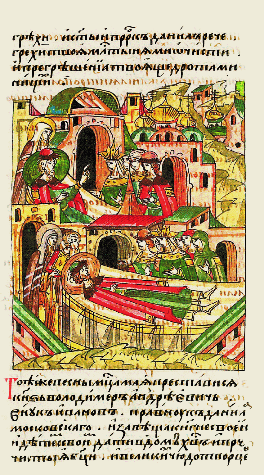 В ту же весну ме- сяца мая пре- ставился князь Владимир Андреевич, внук Иванов, правнук Даниила Московско- го, и завещал своей княгине, своим детям отдать в дом Христов и Пречистой Бого- родицы, и великих чудотворцев [Петра и Алексия, и митрополиту, отцу своему преосвящен- ному Фотию, митро- политу Киевскому и всея Руси, в помин по себе и по своему роду село Кудрино с деревнями, со всеми угодьями, как было заведено в старые времена. ]